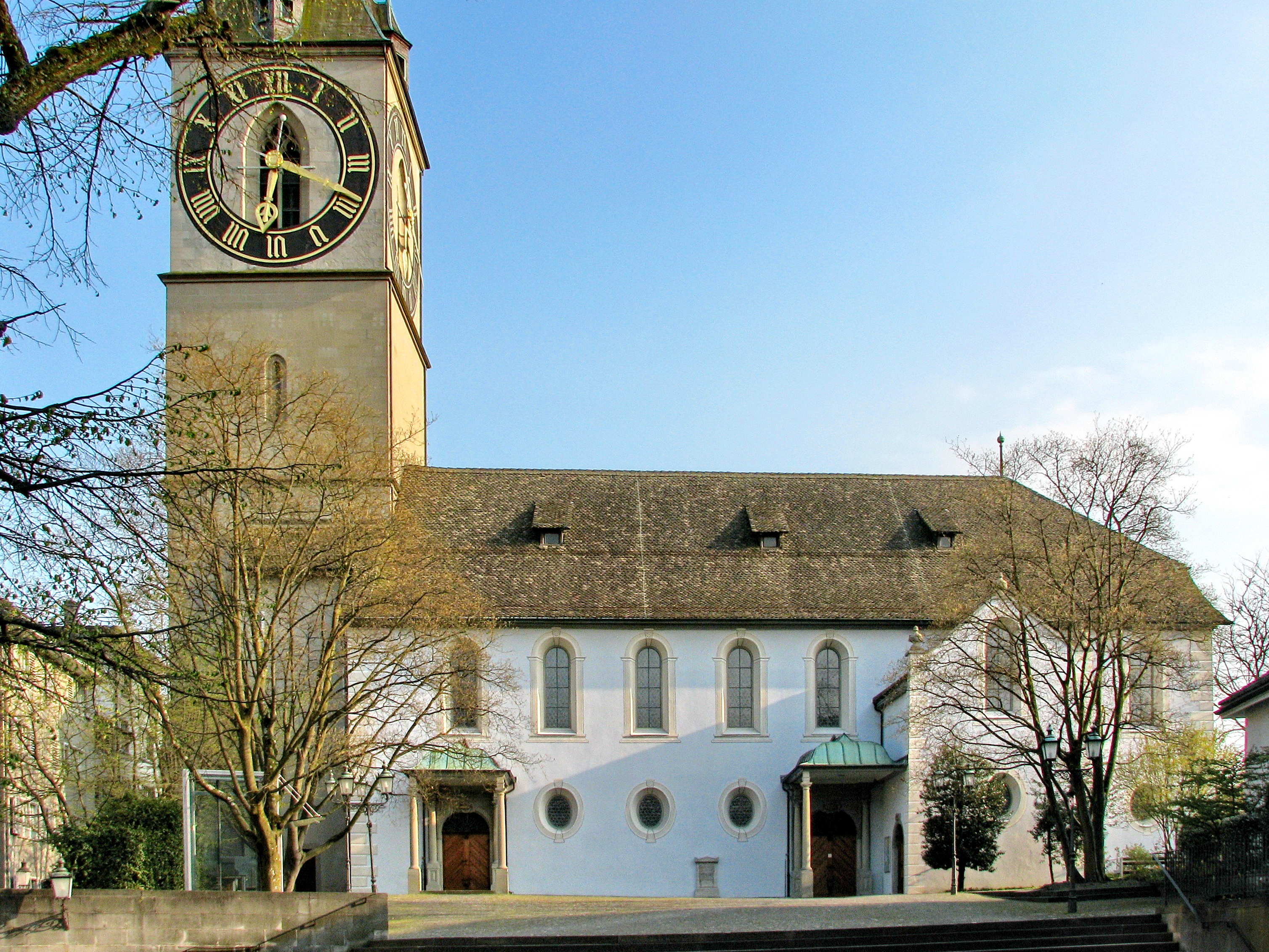 St. Peter Church in Zürich (Switzerland) as seen from St. Peterhofstatt